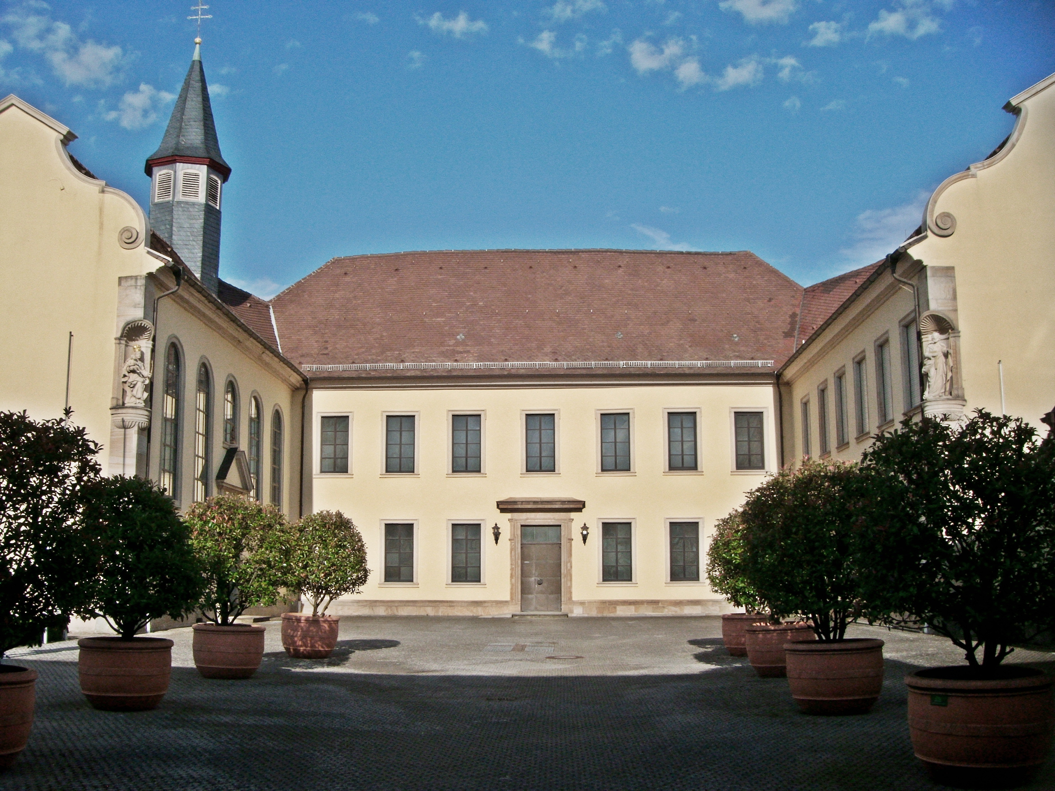 Hallbergsches Schloss Fußgönheim, Blick vom Schlosshof aus. Links der Kirchenflügel mit Hallberggruft